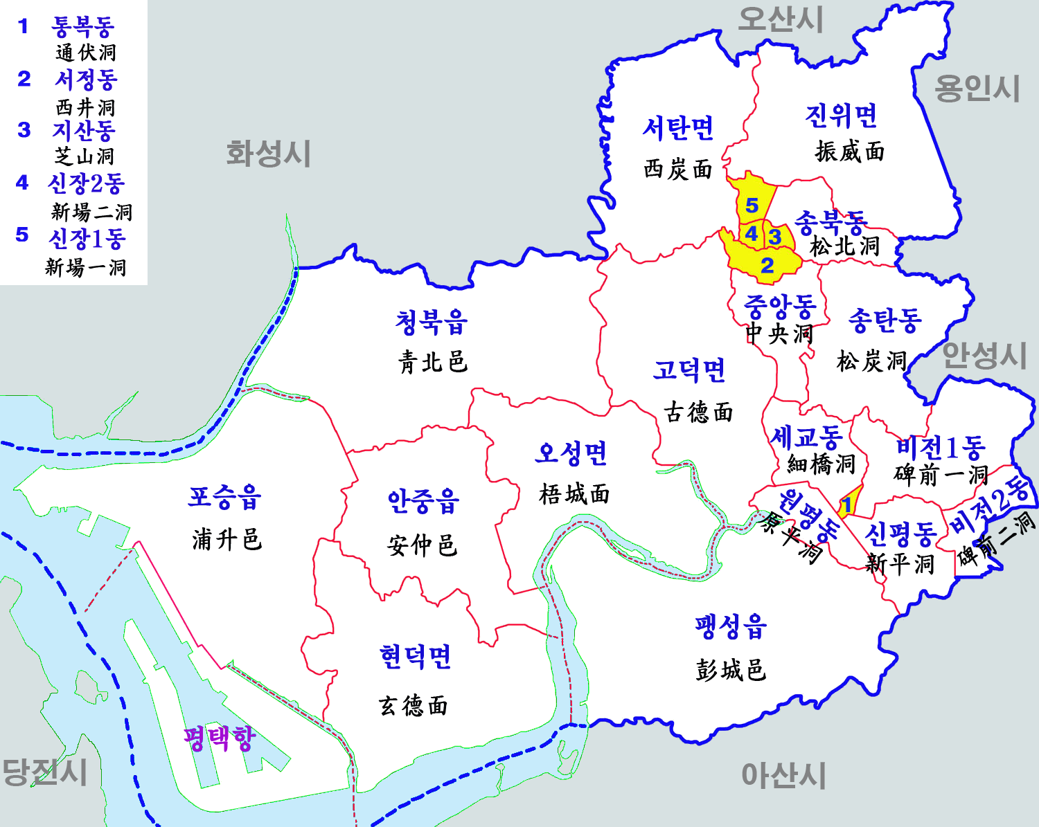 평택시 행정지도